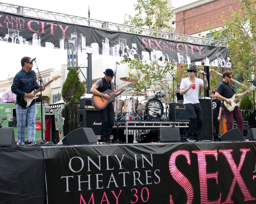 Sugar Ray at some mall